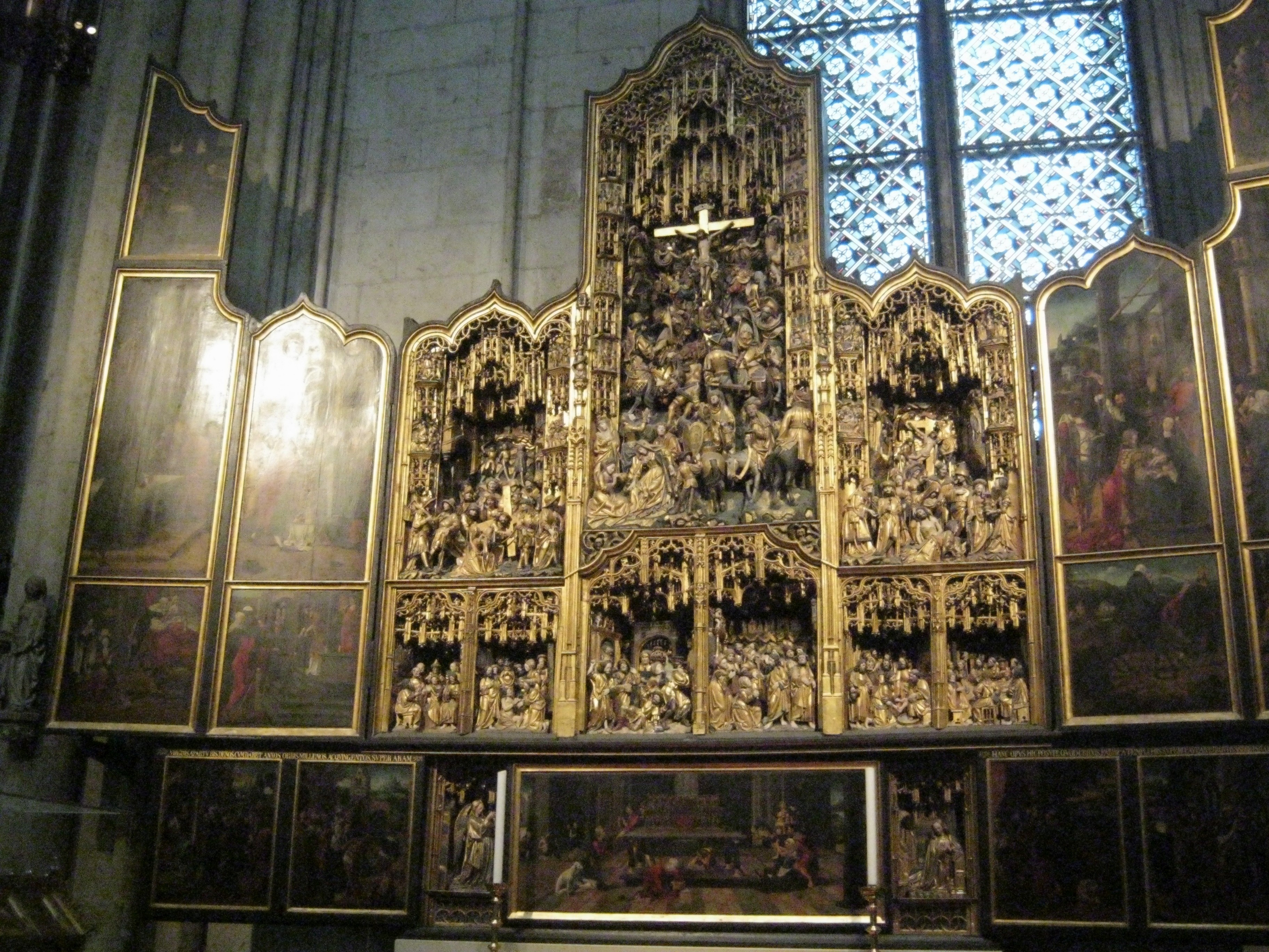 Bei dem Agilolphusaltar im Kölner Dom handelt es sich um einen Antwerpener Schnitzaltar aus dem Jahre 1520.